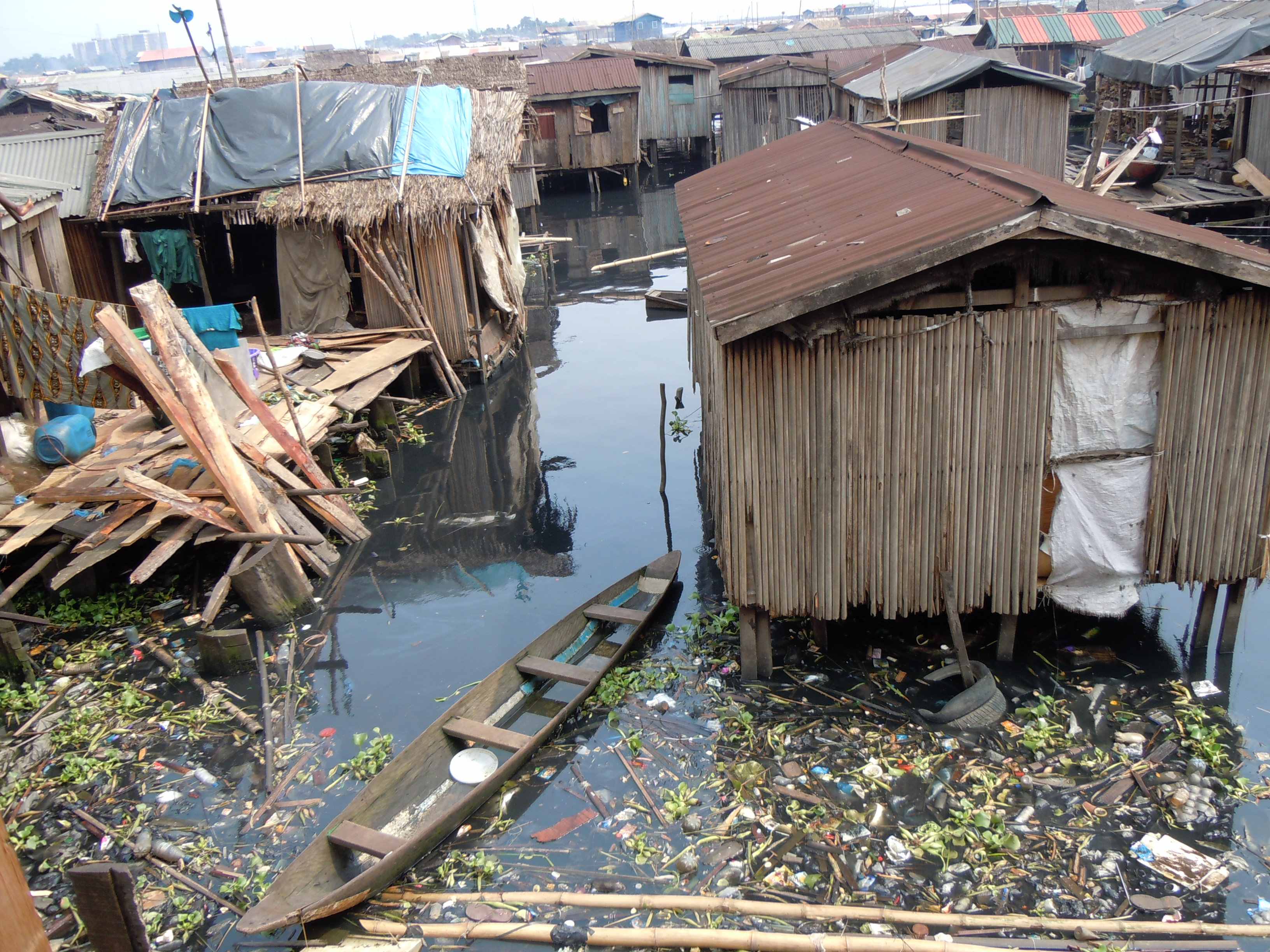 Foto: Heinrich-Böll-Stiftung